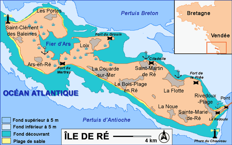 Description : Carte sommaire de l'ile de Ré Date : 2006 Lieu : Ile de Ré, France Author : Réalisation Pline